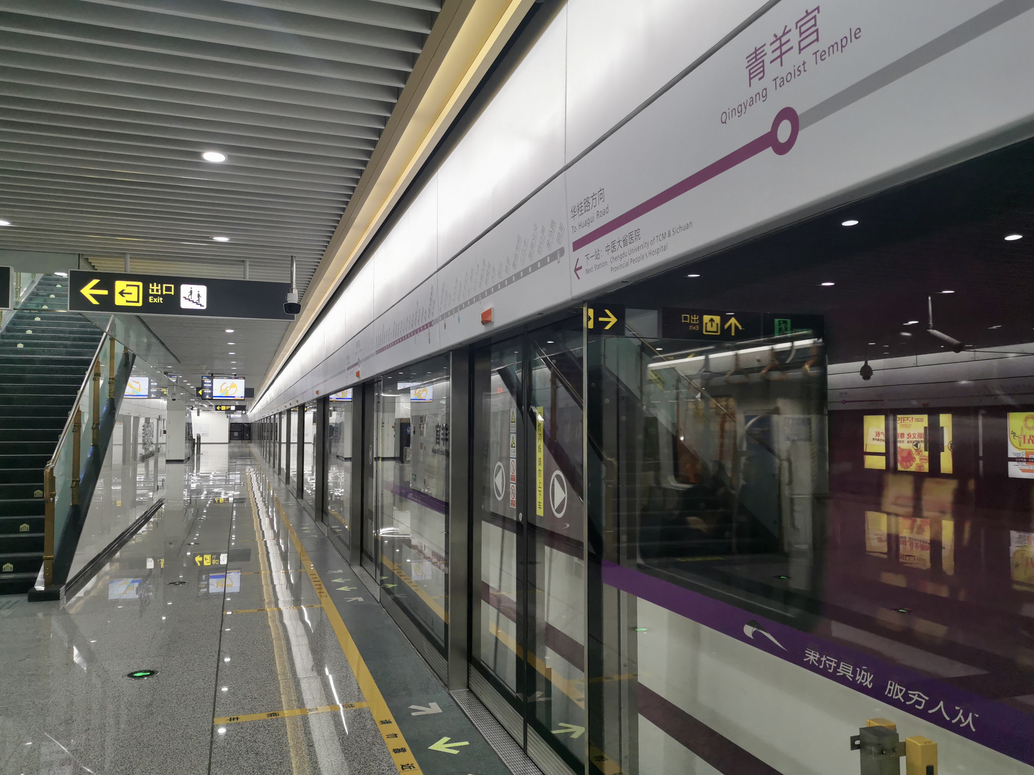 成都地铁5号线青羊宫站站台屏蔽门